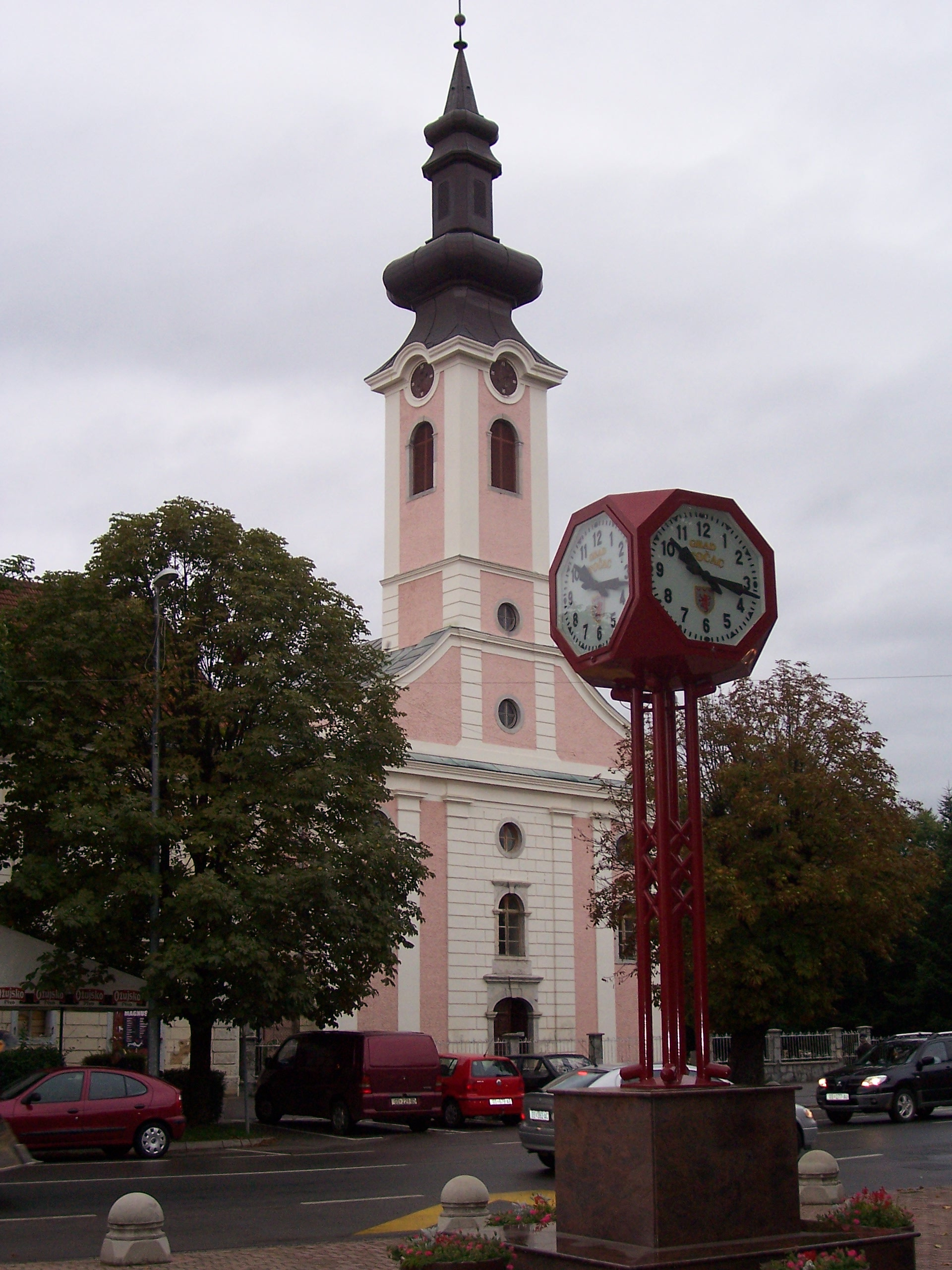 Chiesa Otocac